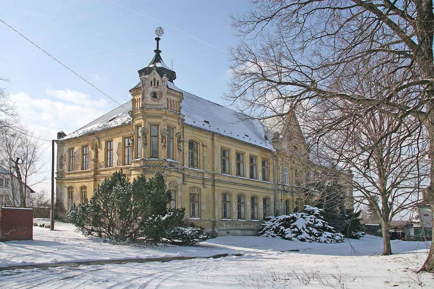 Bývalá škola ve Zbyslavi